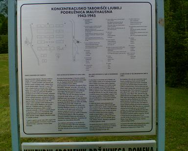 Informationstafel KZ Gedenkstätte am Loiblpass